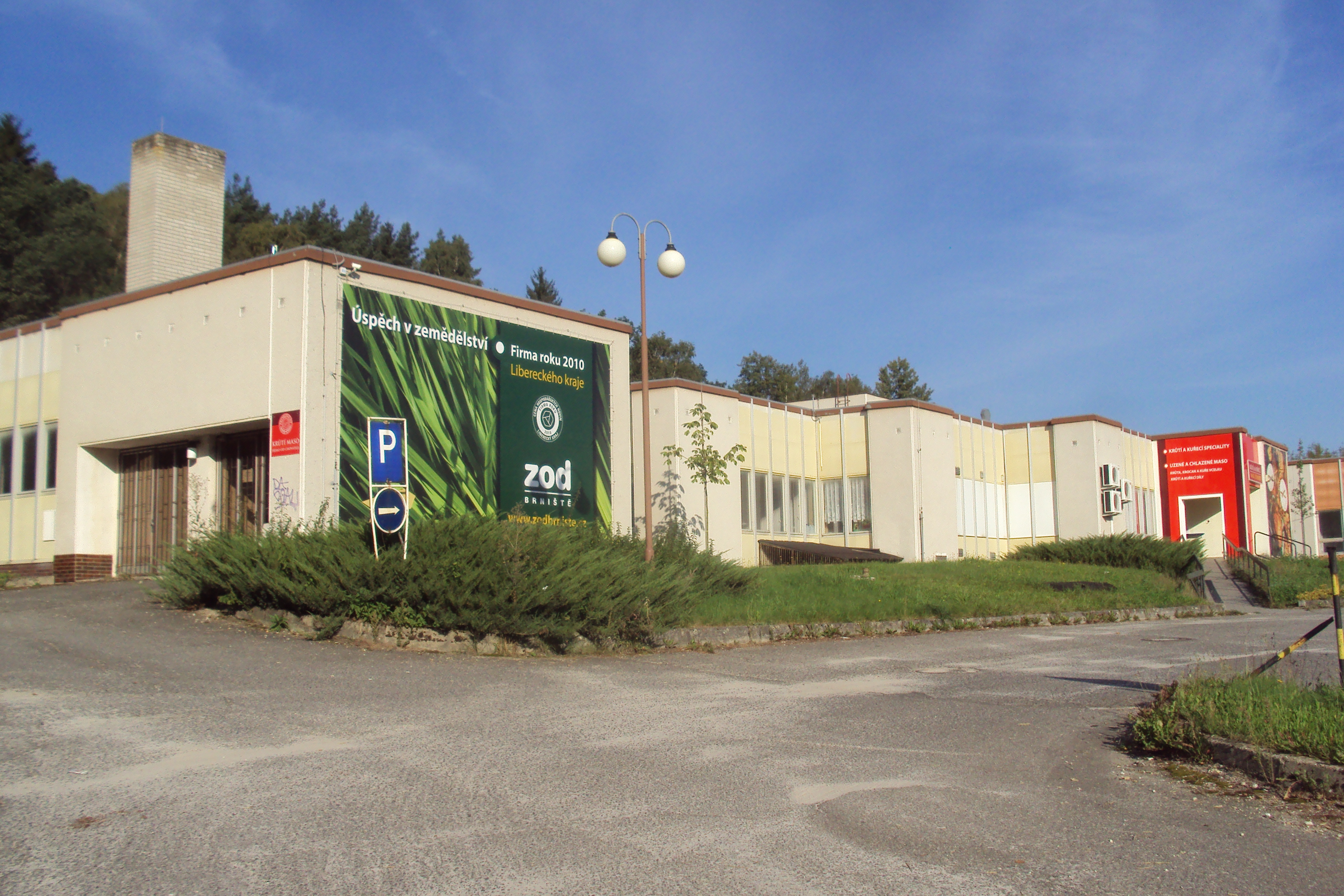 Jedna z provozoven ZOD Brniště, kousek za obcí u výpadovky na Mimoň